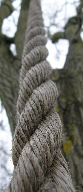 Kletterseil im Garten